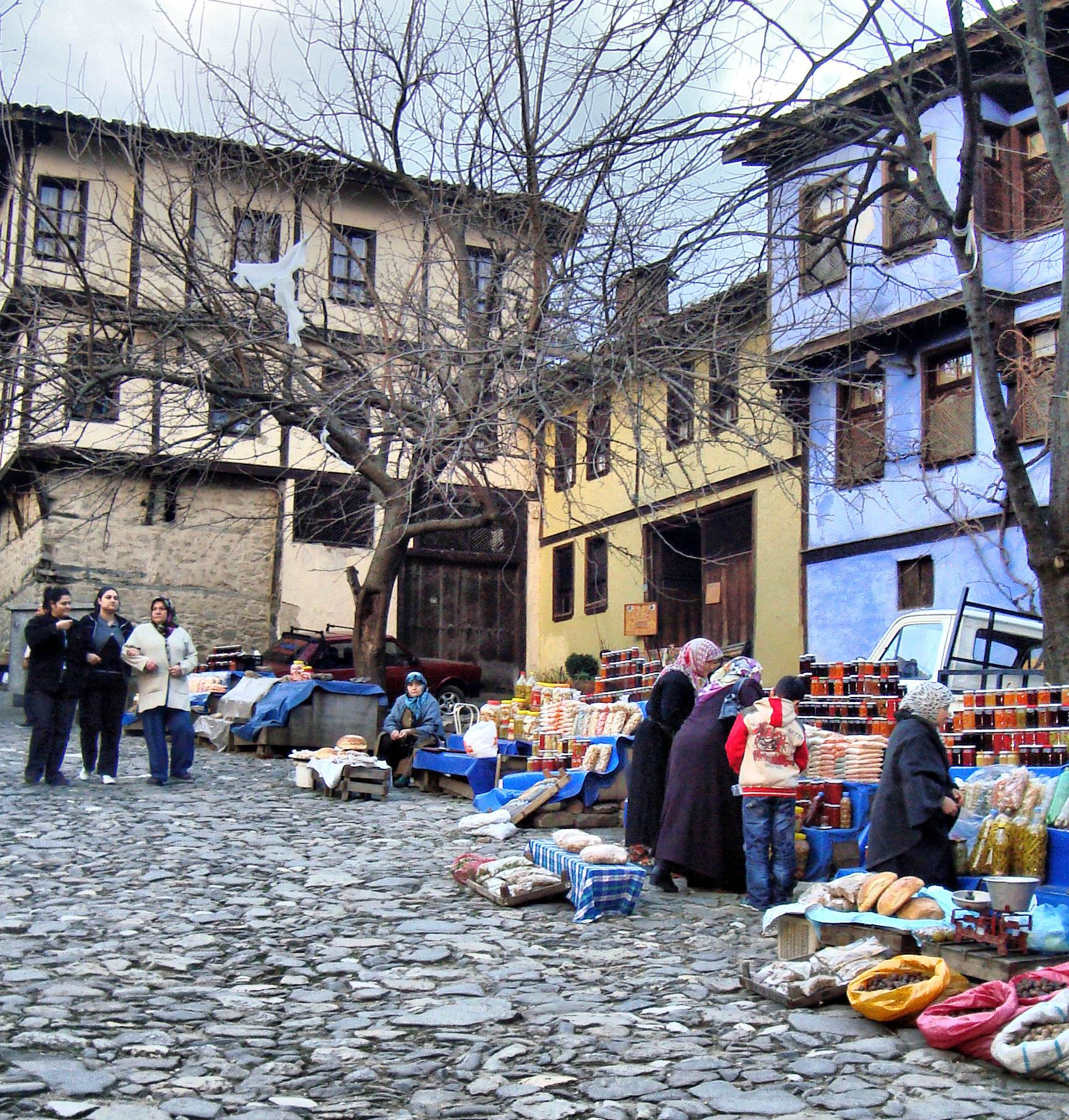 Cumalıkızık-Old Ottoman village-Bursa